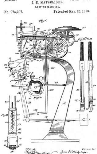 Zwikmachine. Uitgevonden door Jan Ernst Matzeliger in 1883. Lastingmachine. Invented by Jan Ernst Matzeliger in 1883